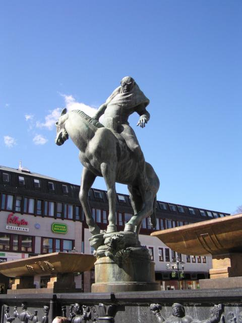 Filbyterfontänen. Foto Olof Ekström 2004. Folke Filbyter, Folkungabrunnen, Stora torget, Linköping.